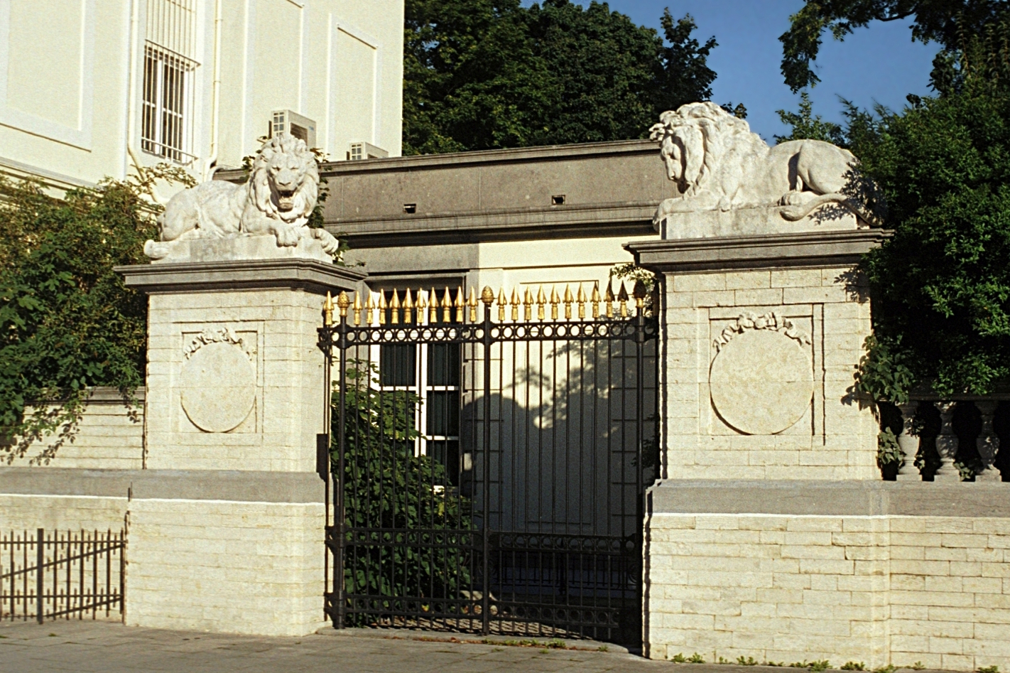 Belgique - Bruxelles - Résidence du Premier ministre de Belgique